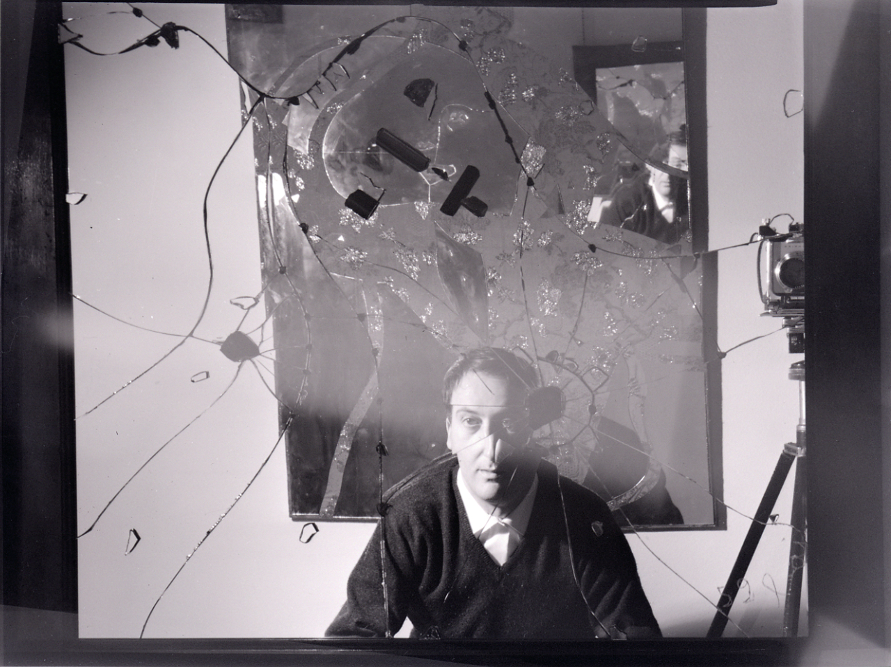 Servizio fotografico : Italia, 1967 / Paolo Monti. - Buste: 14, Fototipi: 18 : Negativo b/n, gelatina bromuro d'argento/ pellicola ; 10x12. - ((Serie costituita da 14 buste di carta, tenute insieme da una graffetta, identificate con i nn.: G4729/1, G4730/2, G4731/3, G4732/4, G4733/4B, G4734/5, G4735/6, G4736/37-7, G4738/39-8, G4740/41-9, G4742/10, G4743/11, G4744/45-12, G4746/13. - Sulla busta G4729: "Baj". - Fonte: Quaderno di Paolo Monti: s.t. [Soggetti e committenti] (1956-1961), presso Archivio Paolo Monti. - Fonte: Rubrica di Paolo Monti: Archivio 10x12 (ultimi numerati) - dal G1 al (s.d.), presso Archivio Paolo Monti. - Fonte: Agenda di Paolo Monti: Monti/ 3 aprile 1966 - 9 marzo 1971/ 12421-16823 (1966-1971), presso Archivio Paolo Monti